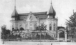 Villa zur Lippe vor Aufstockung 1909